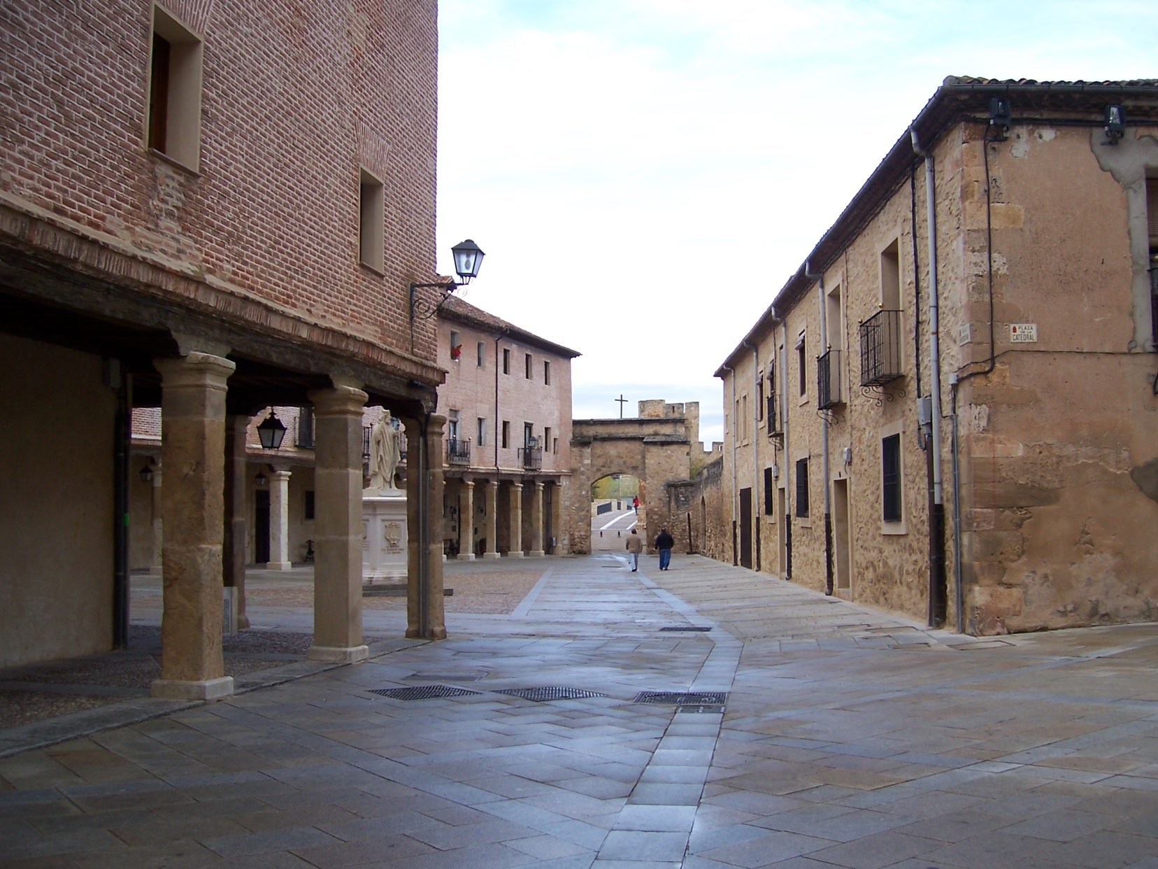 El Burgo de Osma (Soria, España). Al fondo el arco de entrada a la ciudad. Autor de la imagen: LourdesCardenal, octubre de 2005.